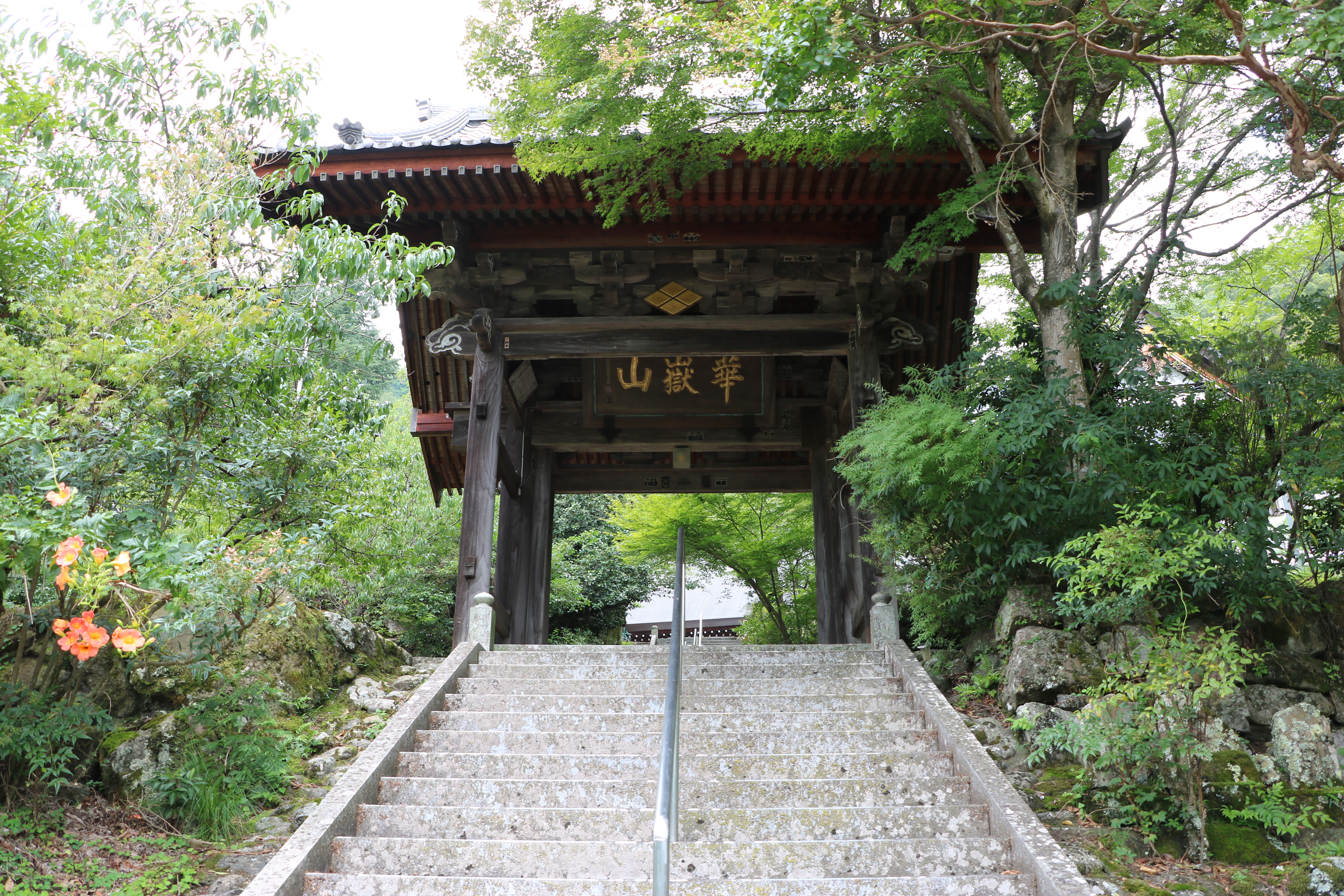 龍雲寺山門（山梨県南巨摩郡身延町）